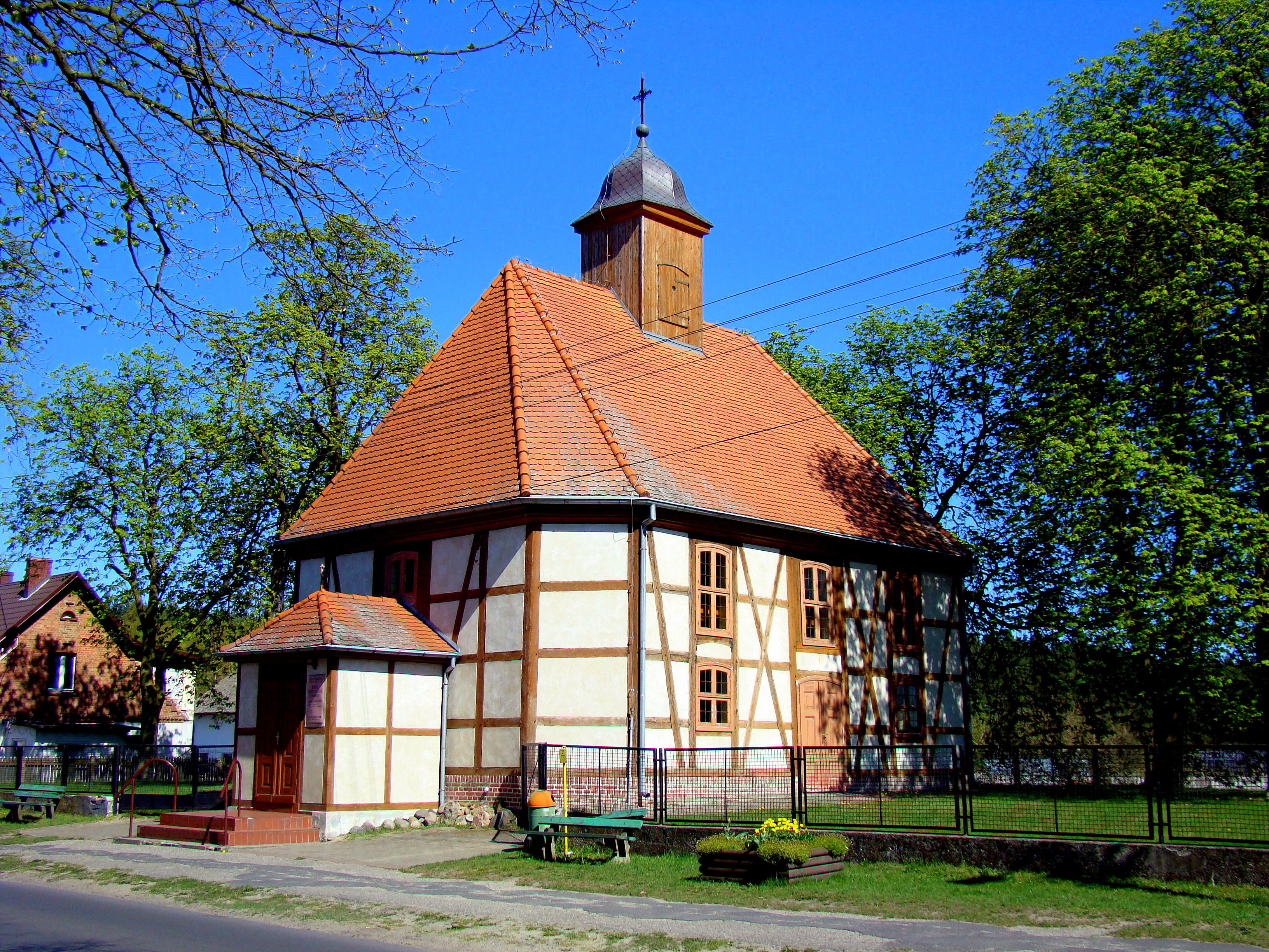 Kościół pod wezwaniem Najświętszej Marii Panny w Niekłończycy, (Gmina Police, Województwo zachodniopomorskie), Polska